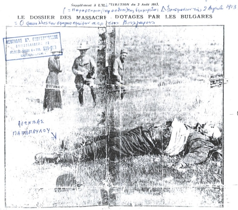 Леонидас Папапавлу